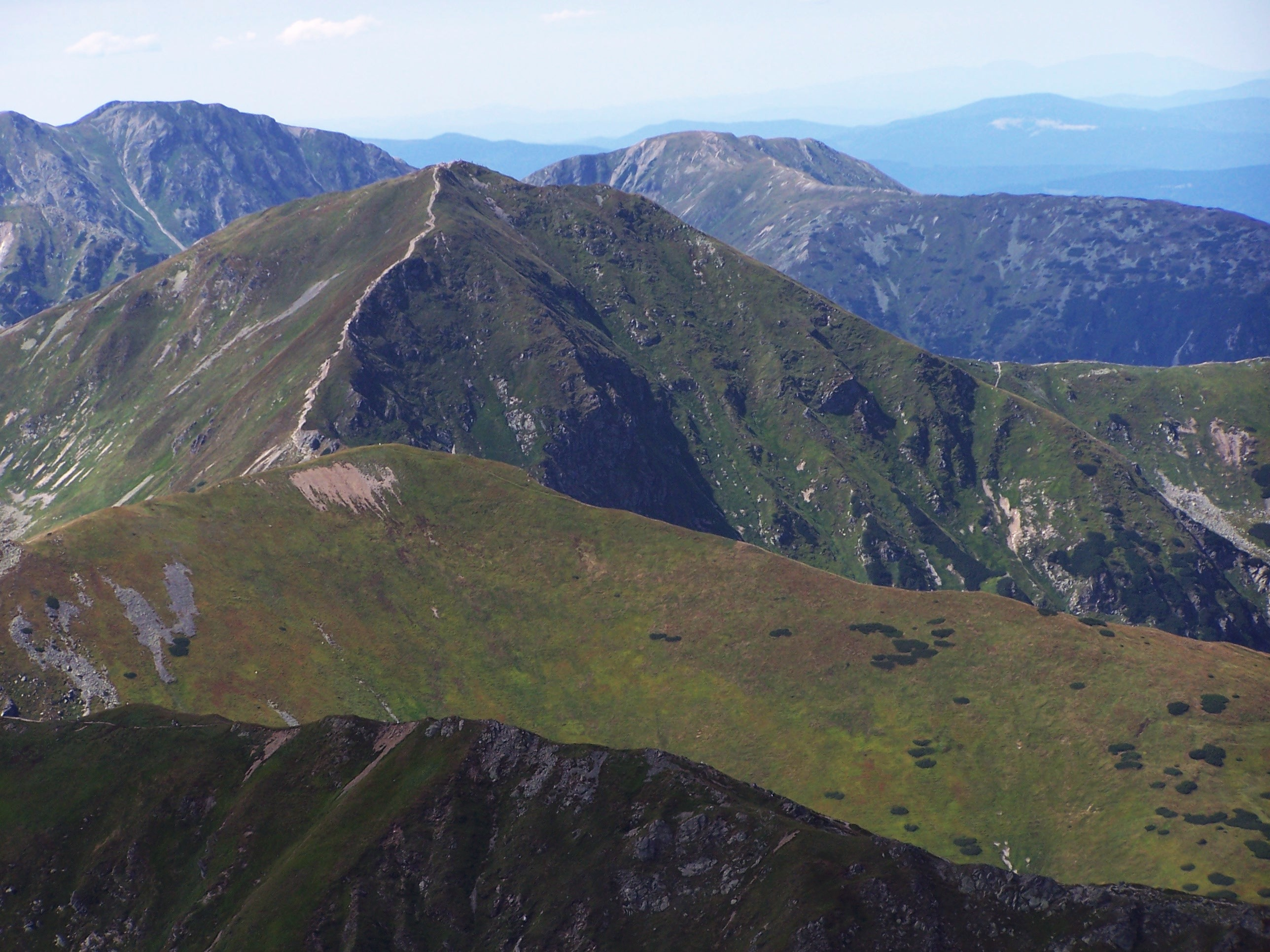 Wołowiec (West Tatra Mountains)